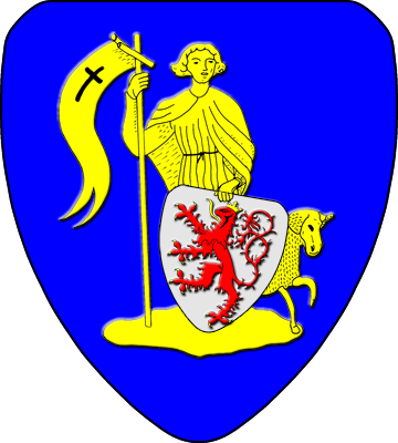 Armoiries de la commune belge de Herve, blasonné d'azur à un Saint Jean Baptiste d'or posé sur un tertre du mesme, chargé des armes de la province de Limbourg qui sont d'argent au lion à la queue fourcée passée en sautoir de gueules, armé, lampassé et couronné d'or.